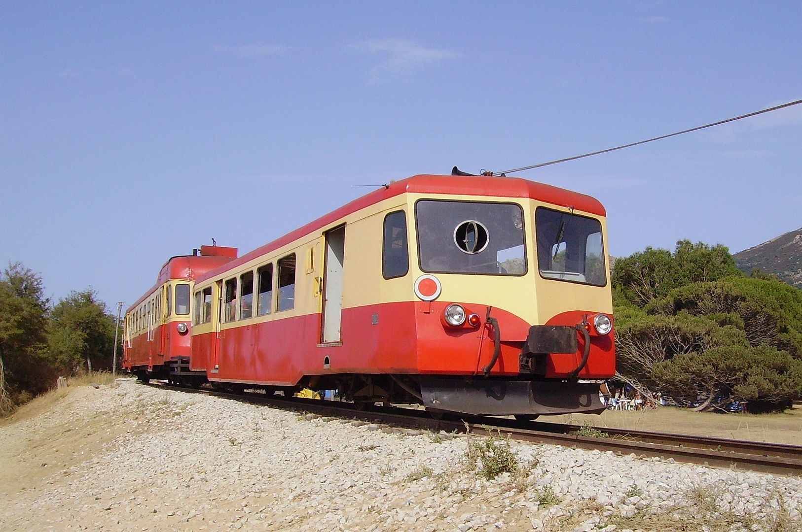 L'autorail ABH8 N°206 et la remorque XR 113 des chemins de fer de la Corse, à Aregno-plage le 22 juillet 2009.